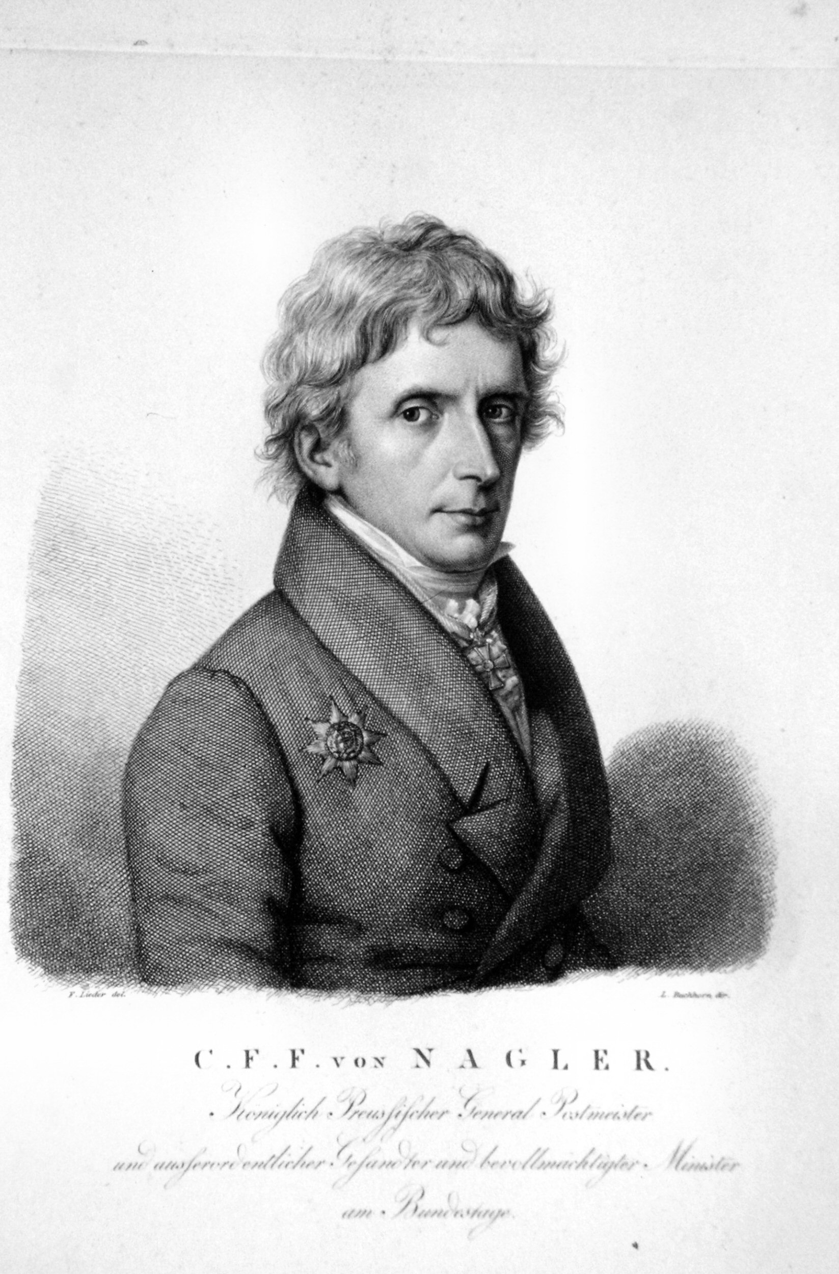 Karl Ferdinand Friedrich von Nagler, Kupferstich von Ludwig Buchhorn nach Friedrich Johann Gottlieb Lieder